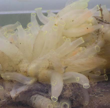 Description=Ciona intestinalis adulte Source=photo personnelle Date=février 2007 Auteur= Perezoso Permission= GFDL Other_versions= Cionaintestinalis